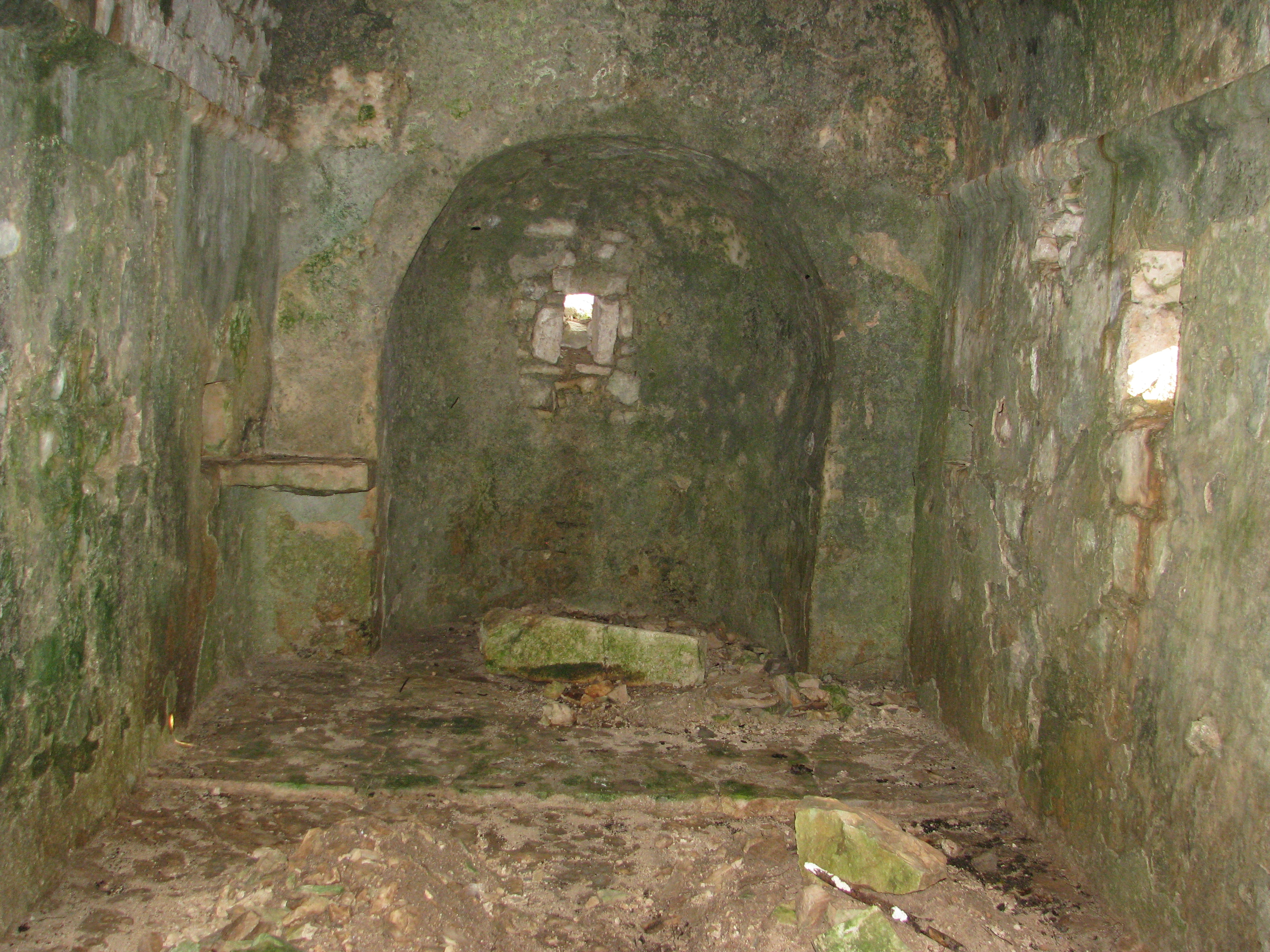 NKD629, Pravoslavna crkva sv. Vrača (Vračevica) sa praistorijskom gomilom (tumulusom), Gomiljani. Slika uutrašnjosti crkve.